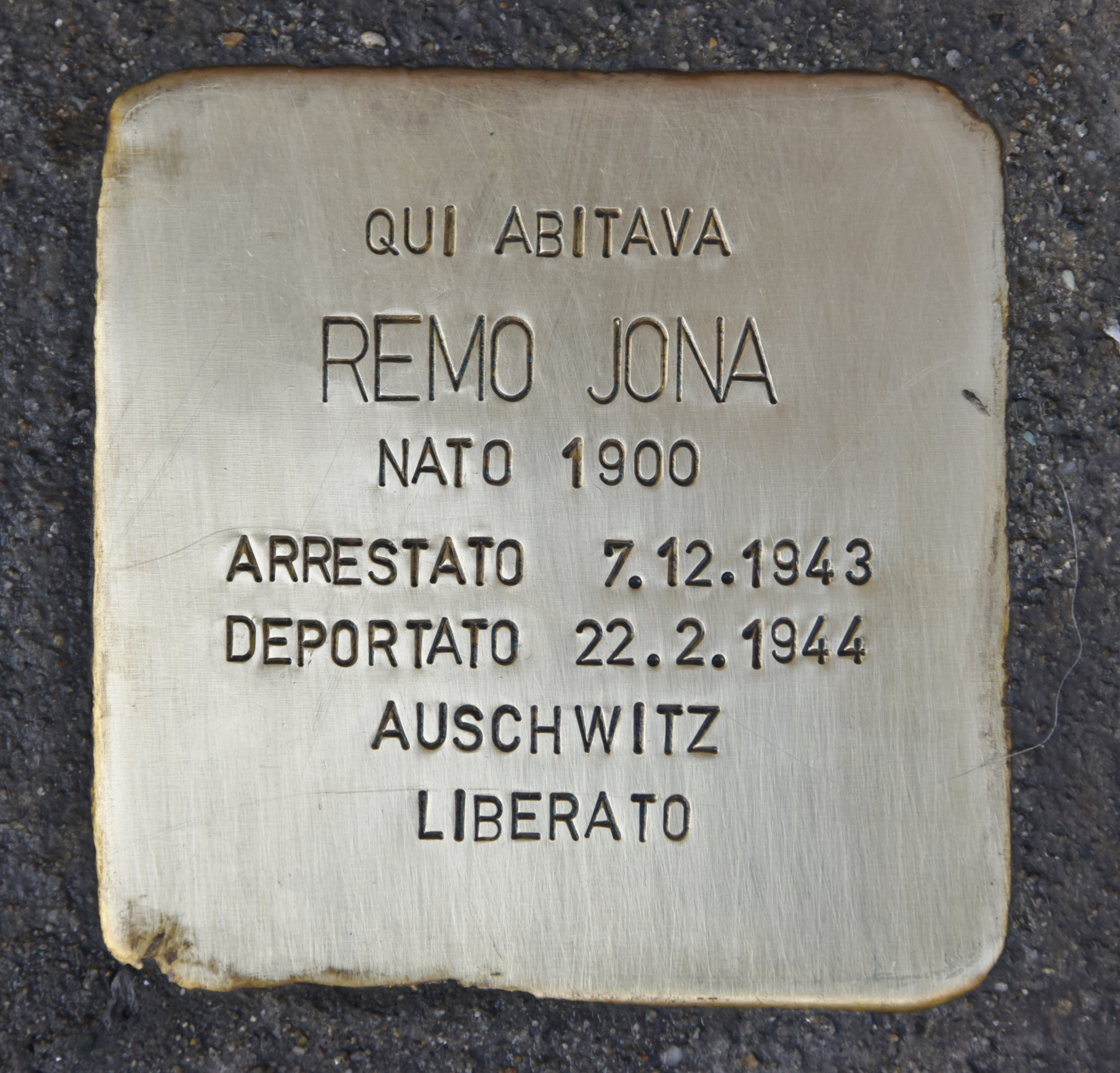 Stolperstein für Remo Jona